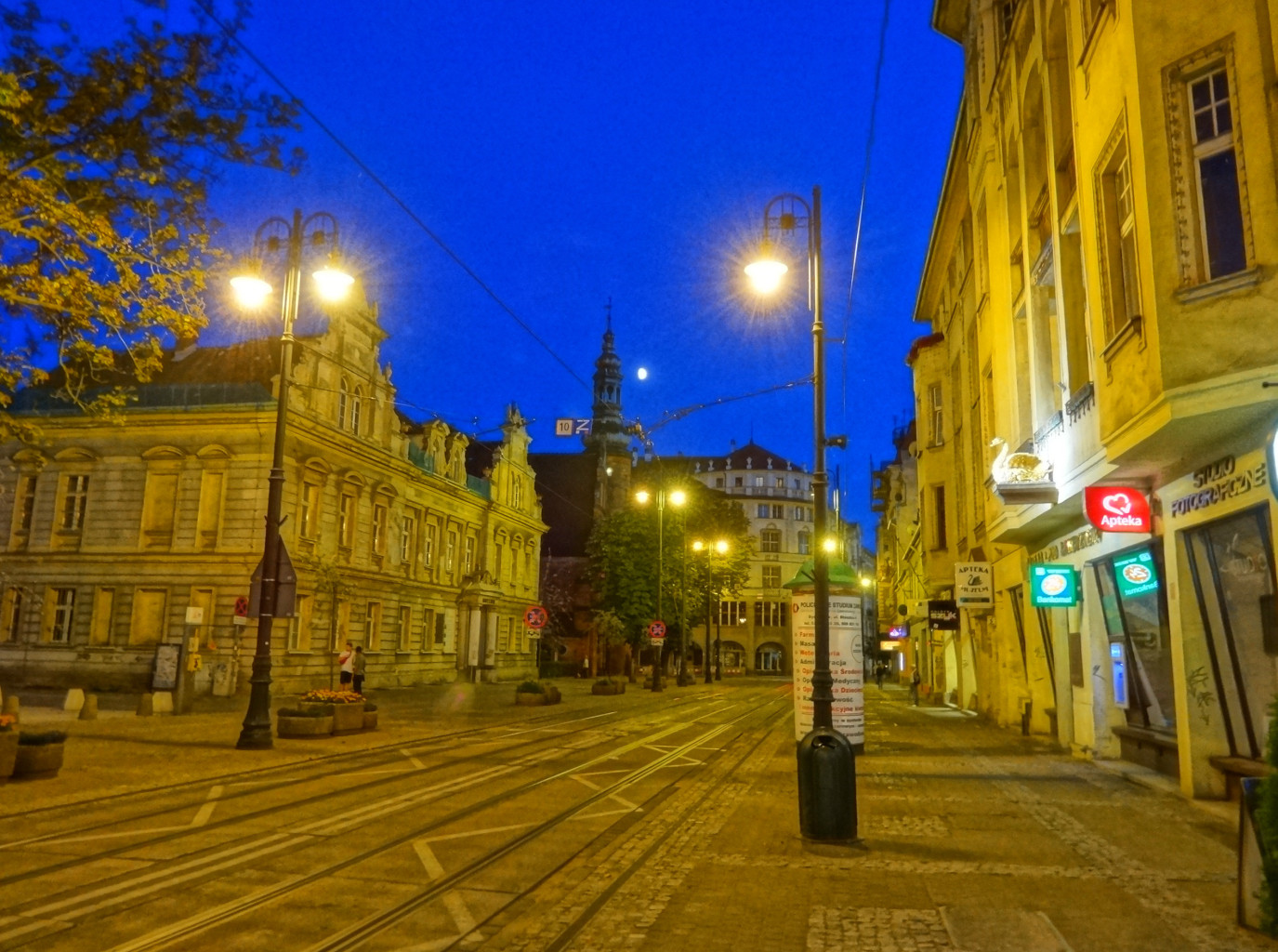 Ulica Gdańska w Bydgoszczy